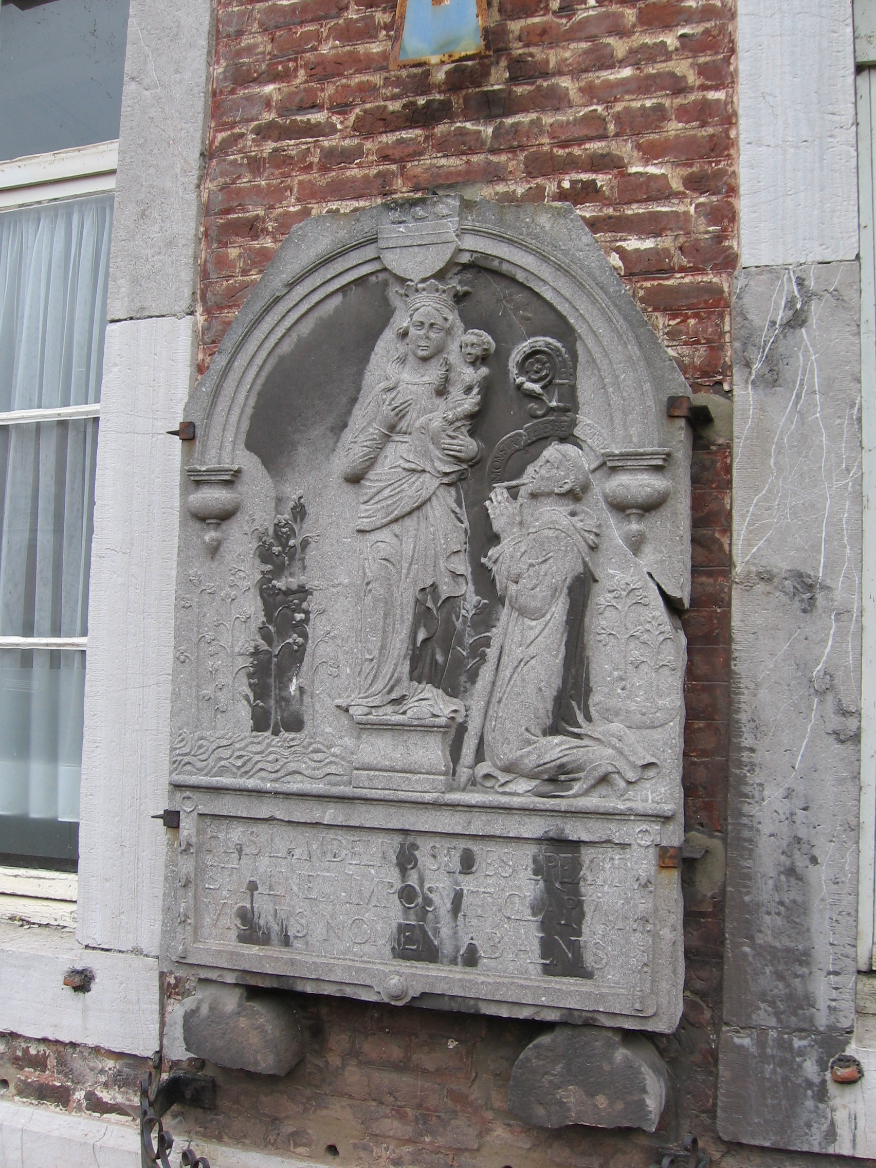 Saint Landelin, fondateur de l'abbaye d'Aulnes (pierre se trouvant sur un mur de l'ancienne abbaye).